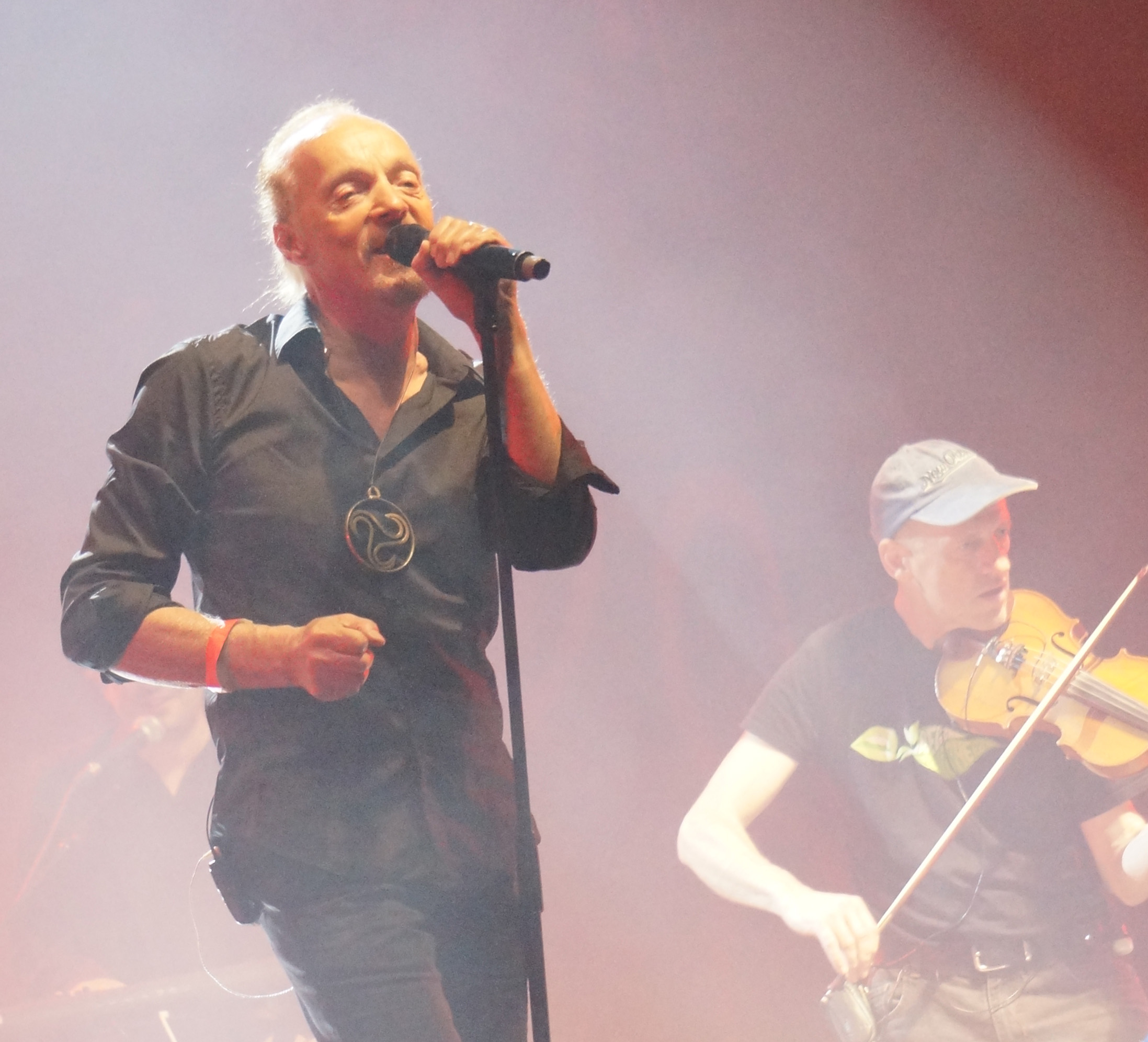 Alan Stivell accompagné de Loumi Séveno lors d'un concert à la foire de Chalons en 2014.